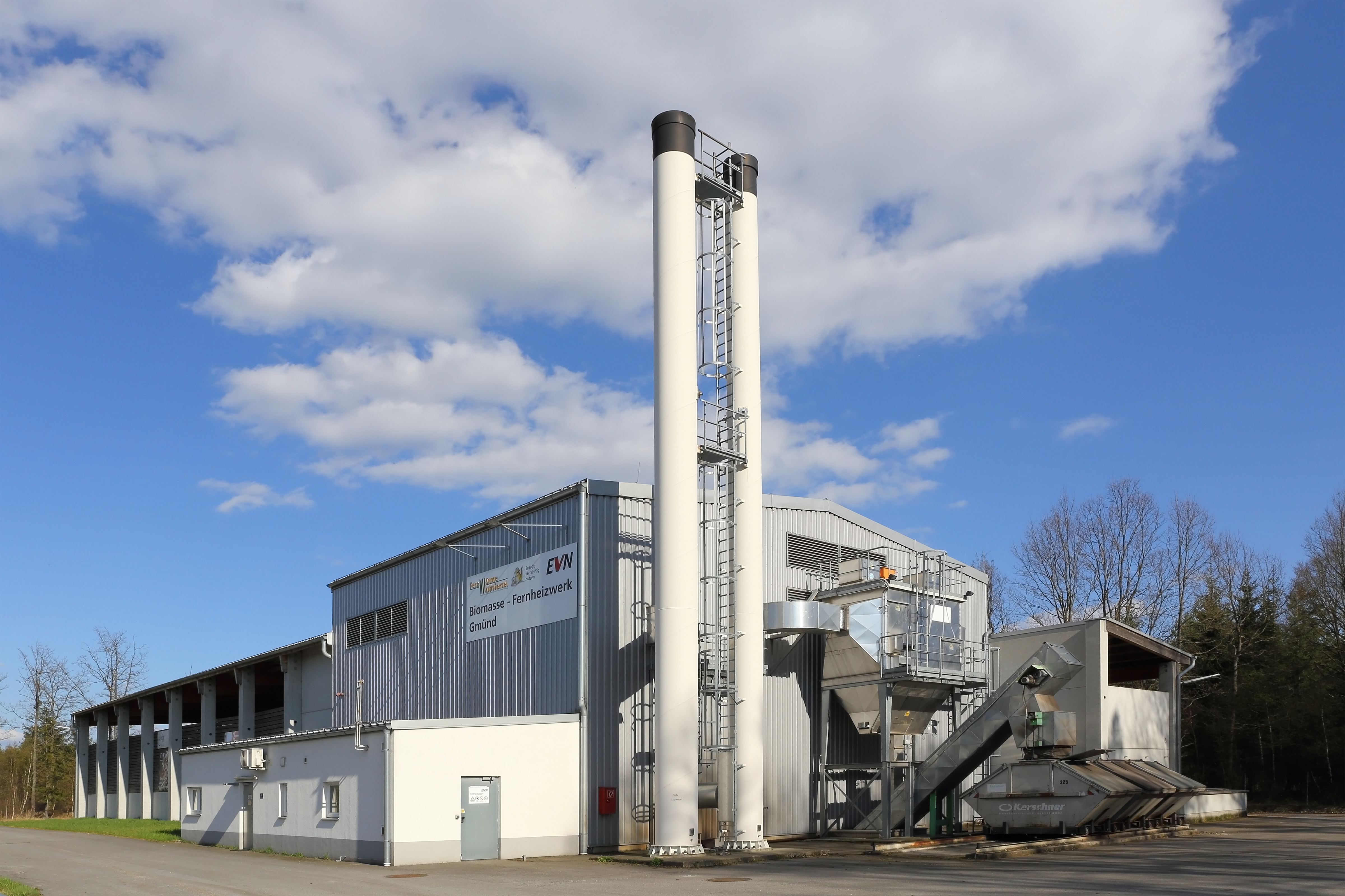 Das 2006 errichtete Fernheizwerk Gmünd hat eine Leistung von 2.500 Kilowatt.